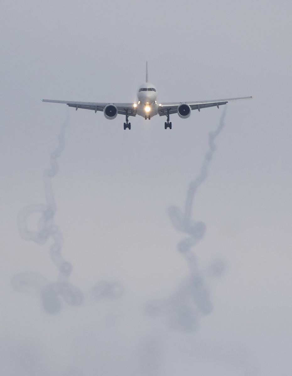 Nordwind Airlines Boeing 757-2Q8 VQ-BAL